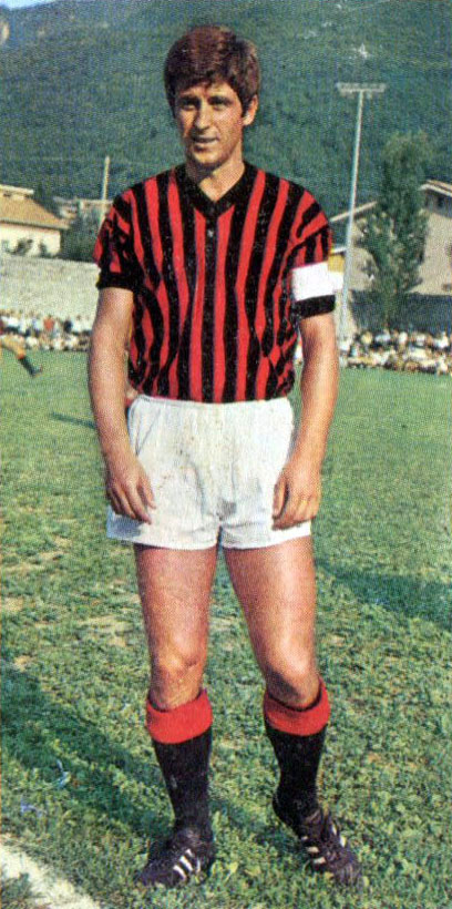 Il calciatore italiano Gianni Rivera, capitano del Milan, all'inizio della stagione 1970-71.